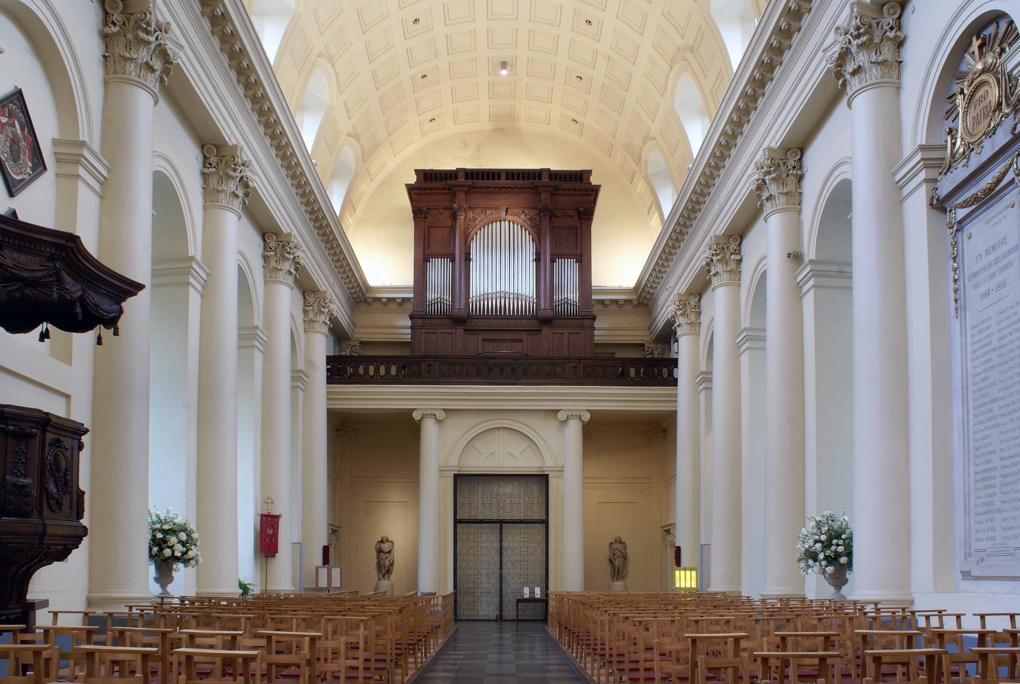 Sint-Jacobskerk-op-Koudenberg - Middenbeuk & orgel